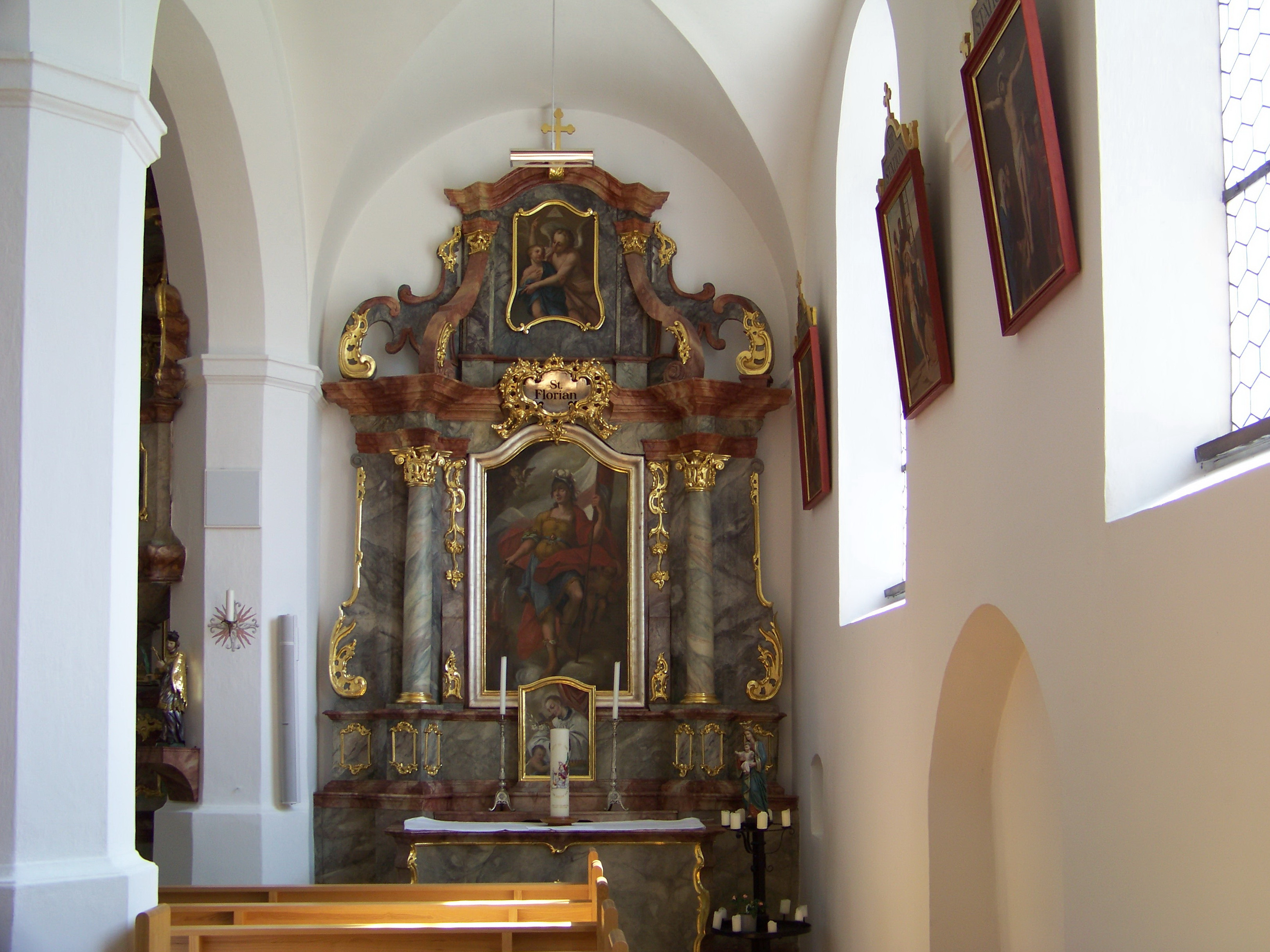 Adlkofen, Hauptstraße 9. Katholische Pfarrkirche St. Thomas. Dreischiffige Basilika. Barocke Anlage mit eingezogenem Chor. Der Altar im südlichen Seitenschiff ist St. Florian geweiht.